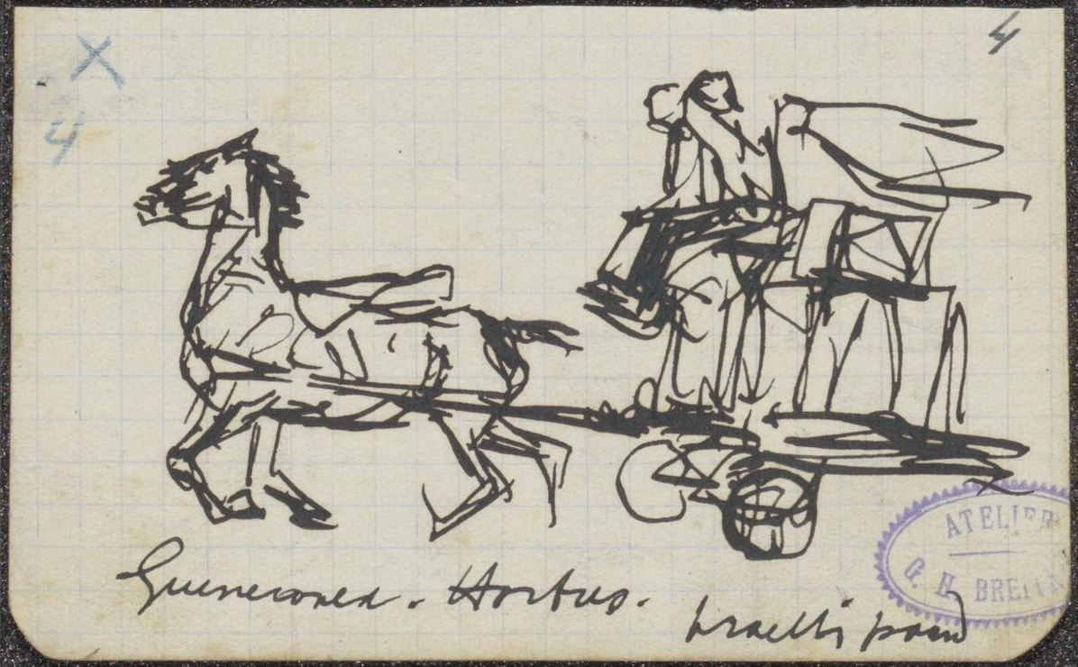 IdentificatieTitel(s): Paard-en-wagen van kolenhandel Groenewold-HortusObjecttype: tekening Objectnummer: RP-T-1949-348Opschriften / Merken: atelierstempel, gestempeld: Lugt 291dannotatie, handgeschreven: ‘Groenewold-Hortus./ prachtig paard’verzamelaarsmerk, verso, gestempeld: Lugt 2228Omschrijving: Op de bok zitten twee figuren.VervaardigingVervaardiger: tekenaar: George Hendrik BreitnerPlaats vervaardiging: AmsterdamDatering: 1890Fysieke kenmerken: pen in zwart op geruit papierMateriaal: geruit papier inkt Techniek: penAfmetingen: h 61 mm × b 99 mmOnderwerpWat: four-wheeled vehicle drawn by one animalVerwerving en rechtenCredit line: Legaat van mevrouw M.C.J. Breitner-Jordan, ZeistVerwerving: legaat 1949Copyright: Publiek domein